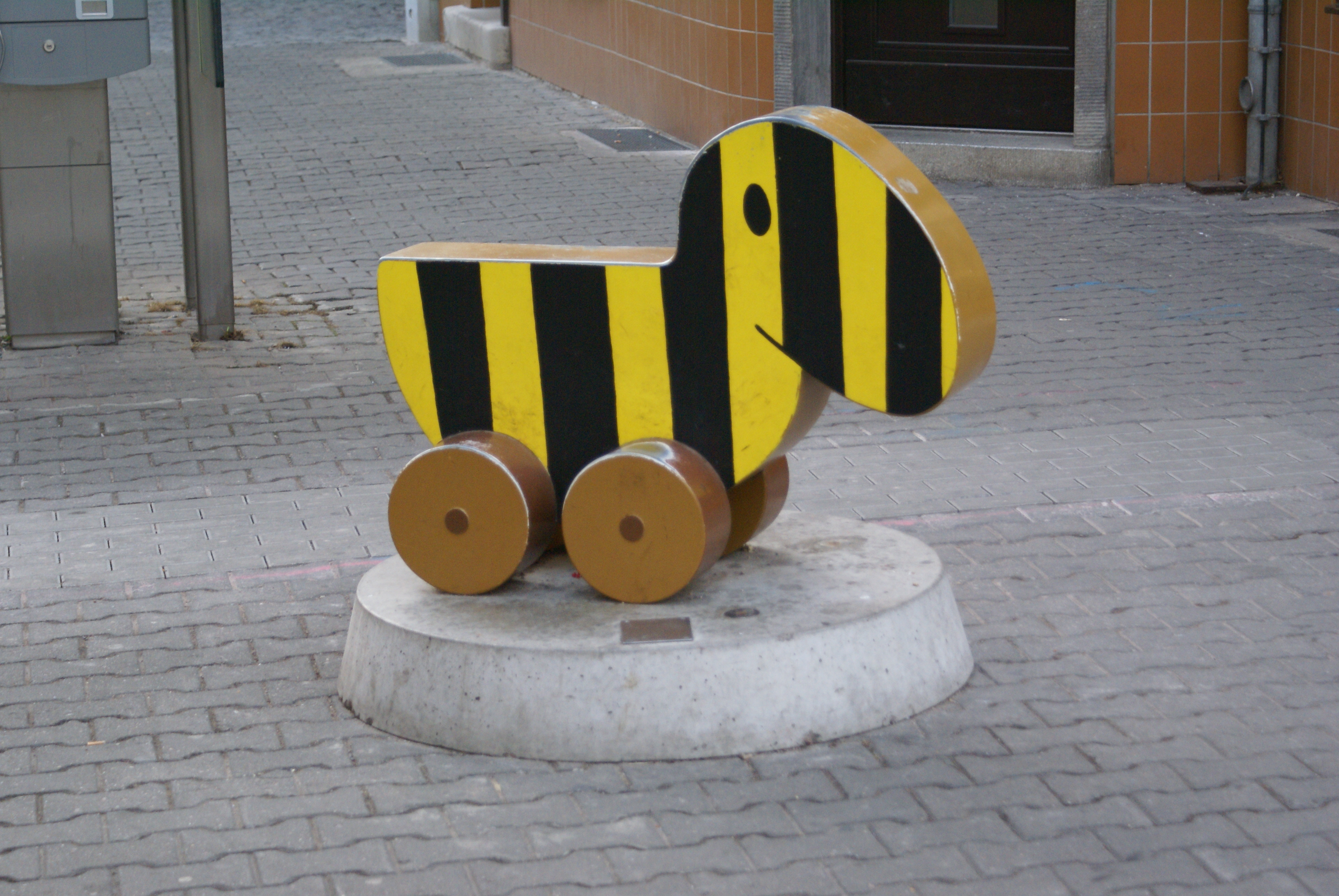 Figur "Tigerente" am Fischmarkt/Predigerstraße in der Erfurter Altstadt.